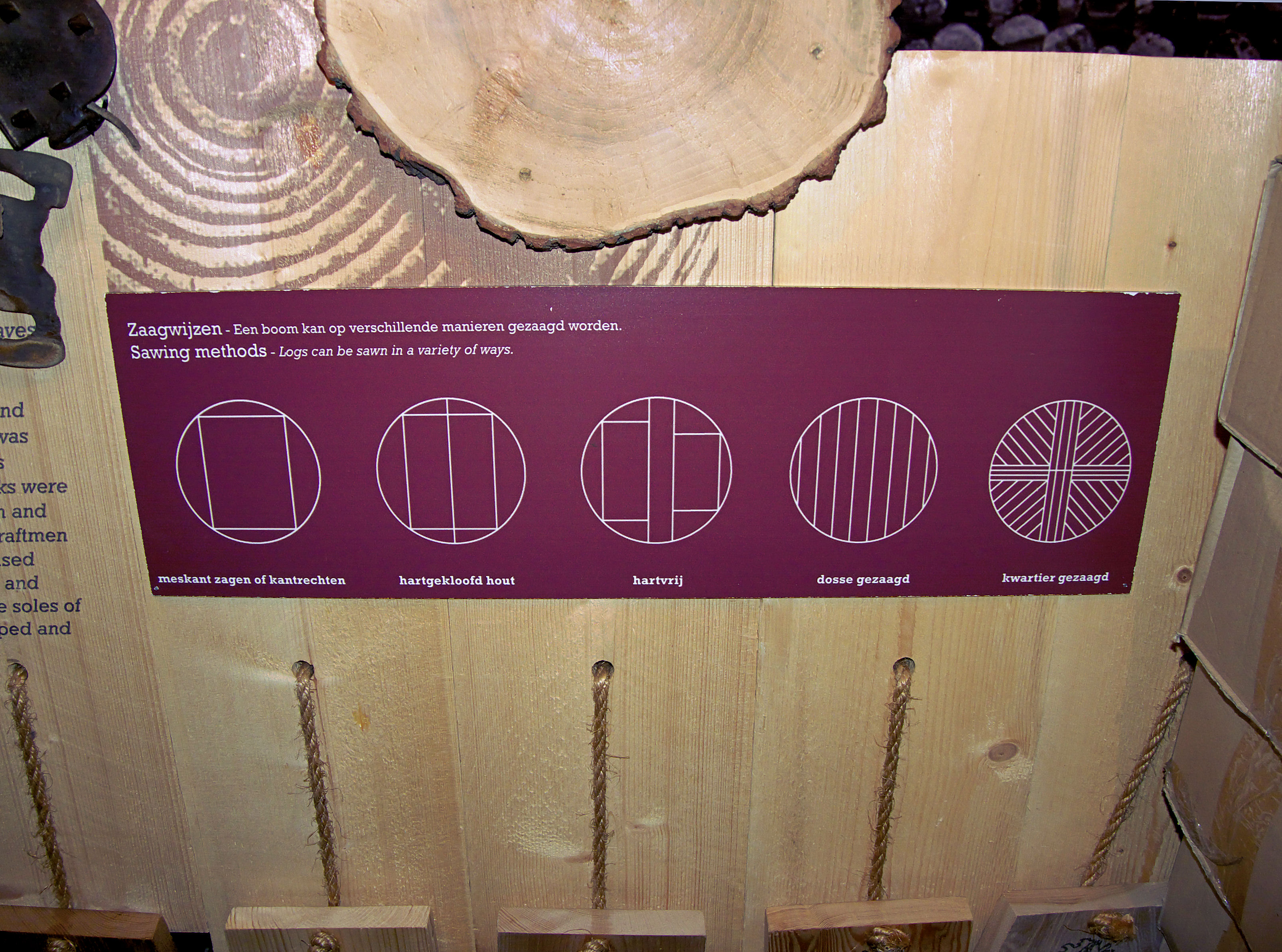 Molen Het Jonge Schaap, houtzagen